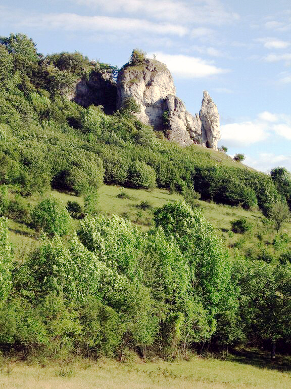 Walberla, vorderer Fels